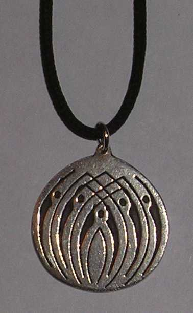 Prometheus-koru